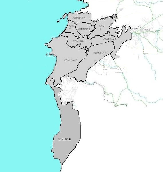 Mapa localidades de Santa Marta